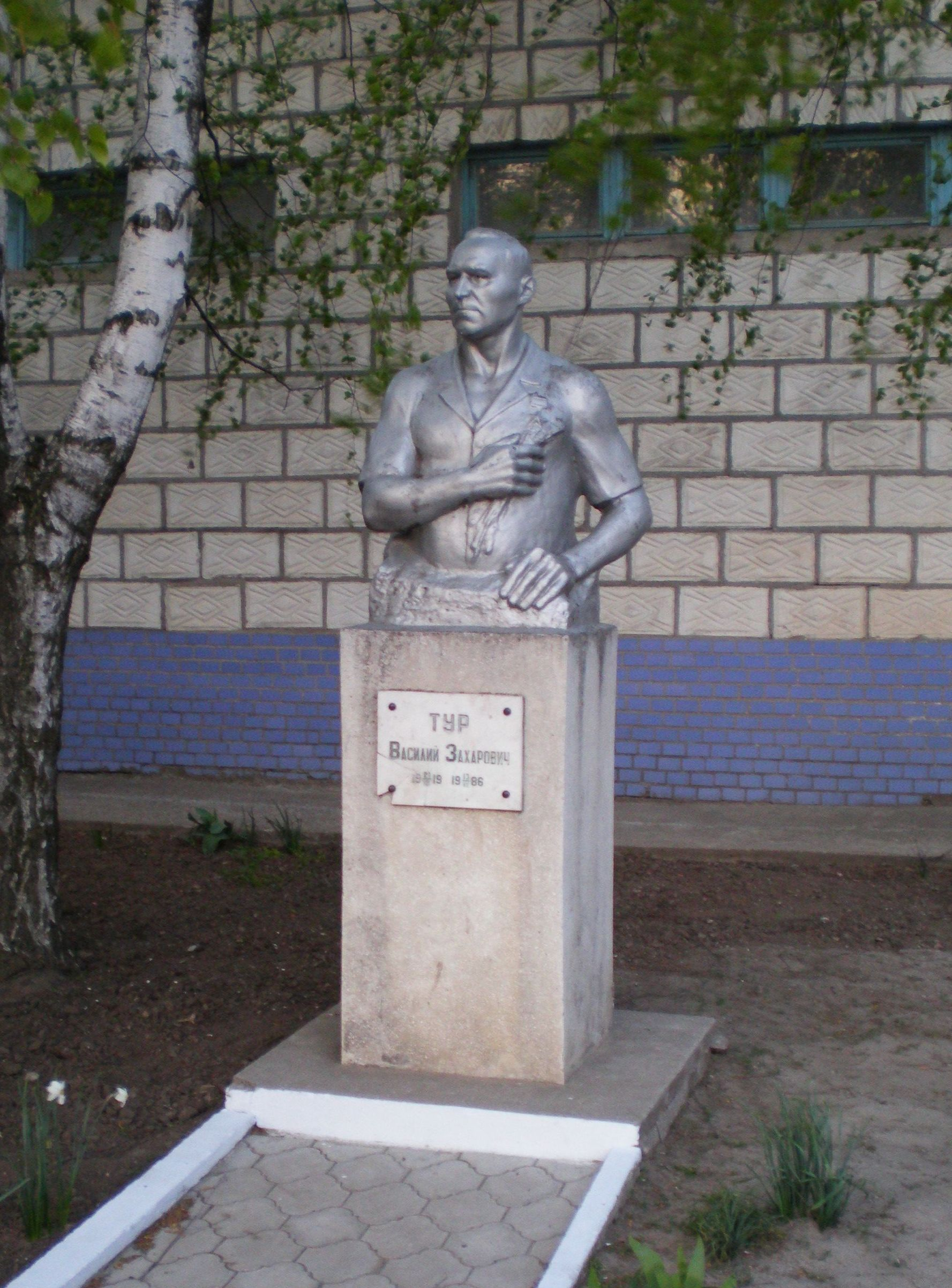 Бюст героя соц. праці Тура В.З.